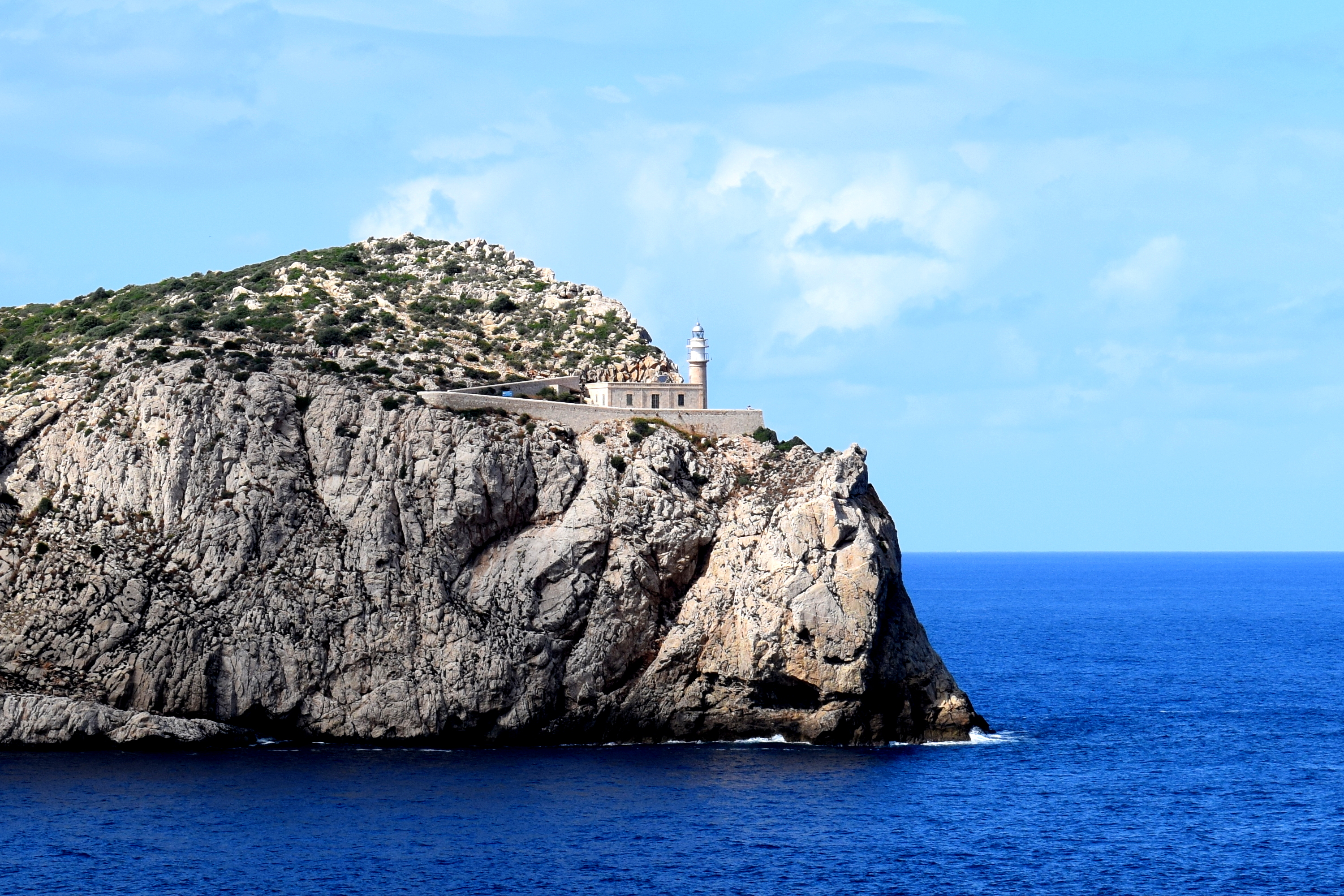 Leuchtturm Far de Tramuntana auf der Insel Sa Dragonera, Balearen, Spanien.